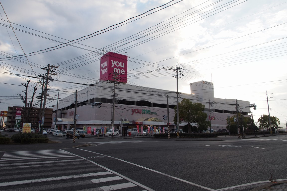 北東（エディオン松永店前）から撮影